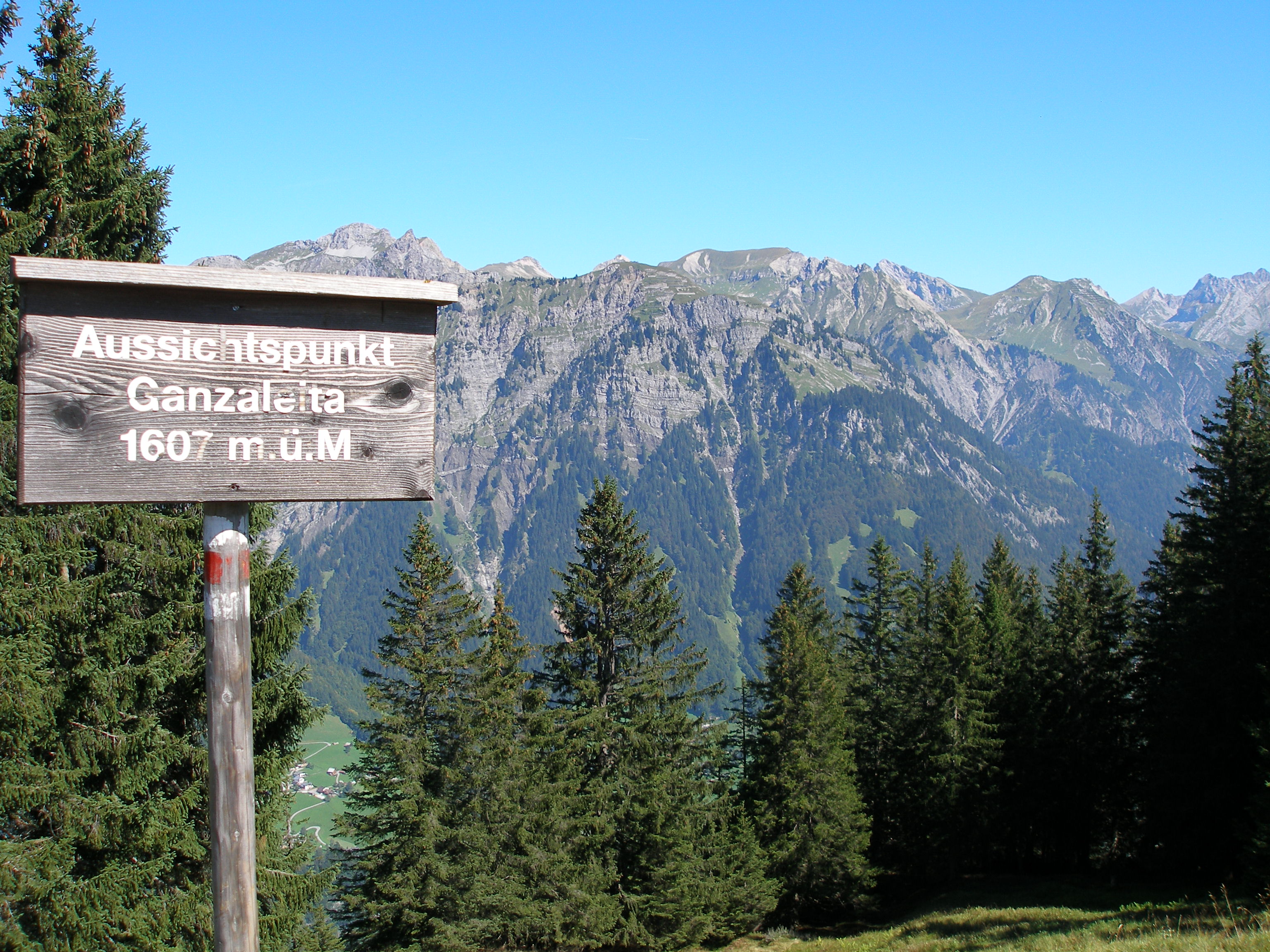 Ganzaleita, Kristberg